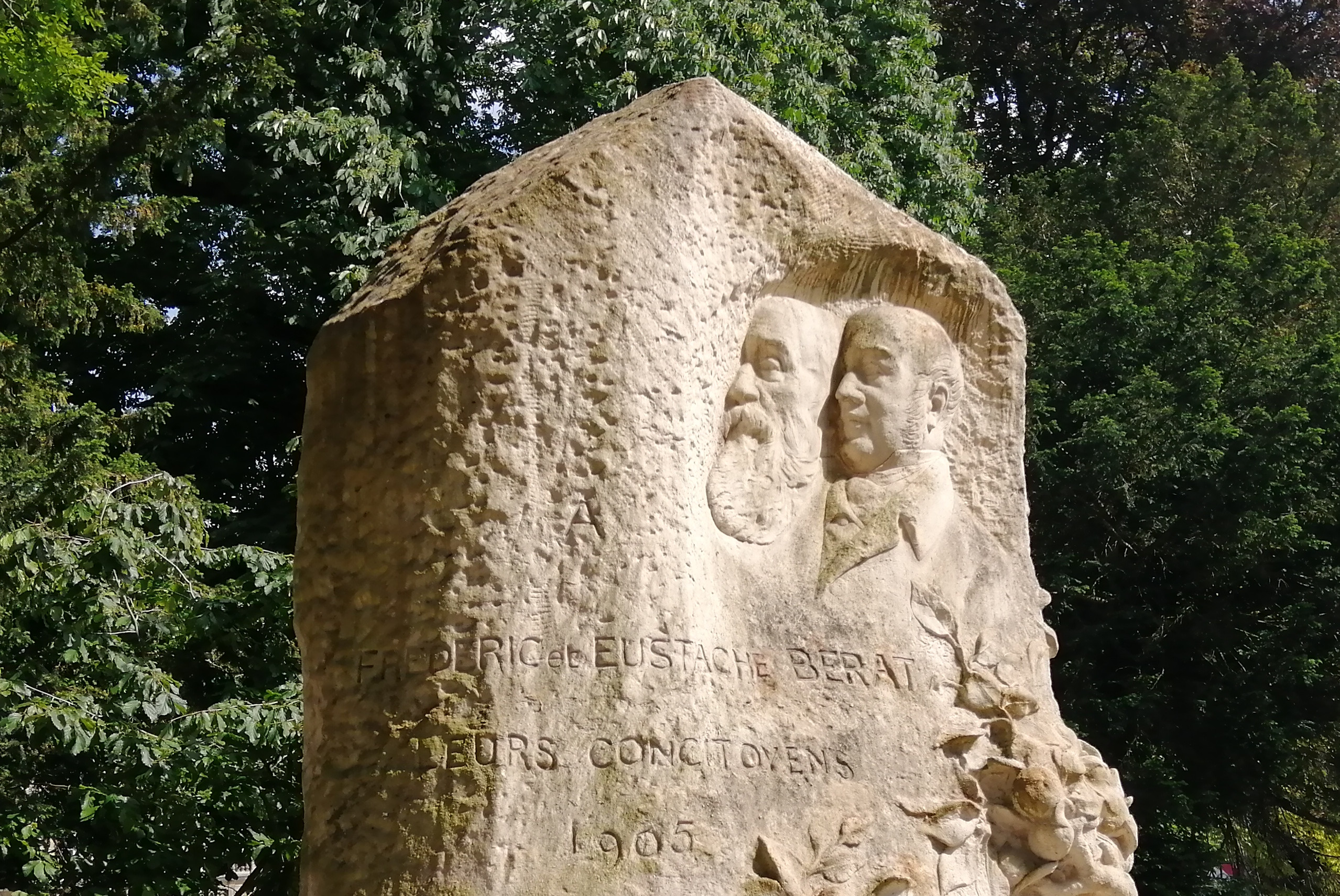 Frederic et Eustache Berat par Alphonse Guilloux, 1905. Square Verdrel à Rouen, détail.